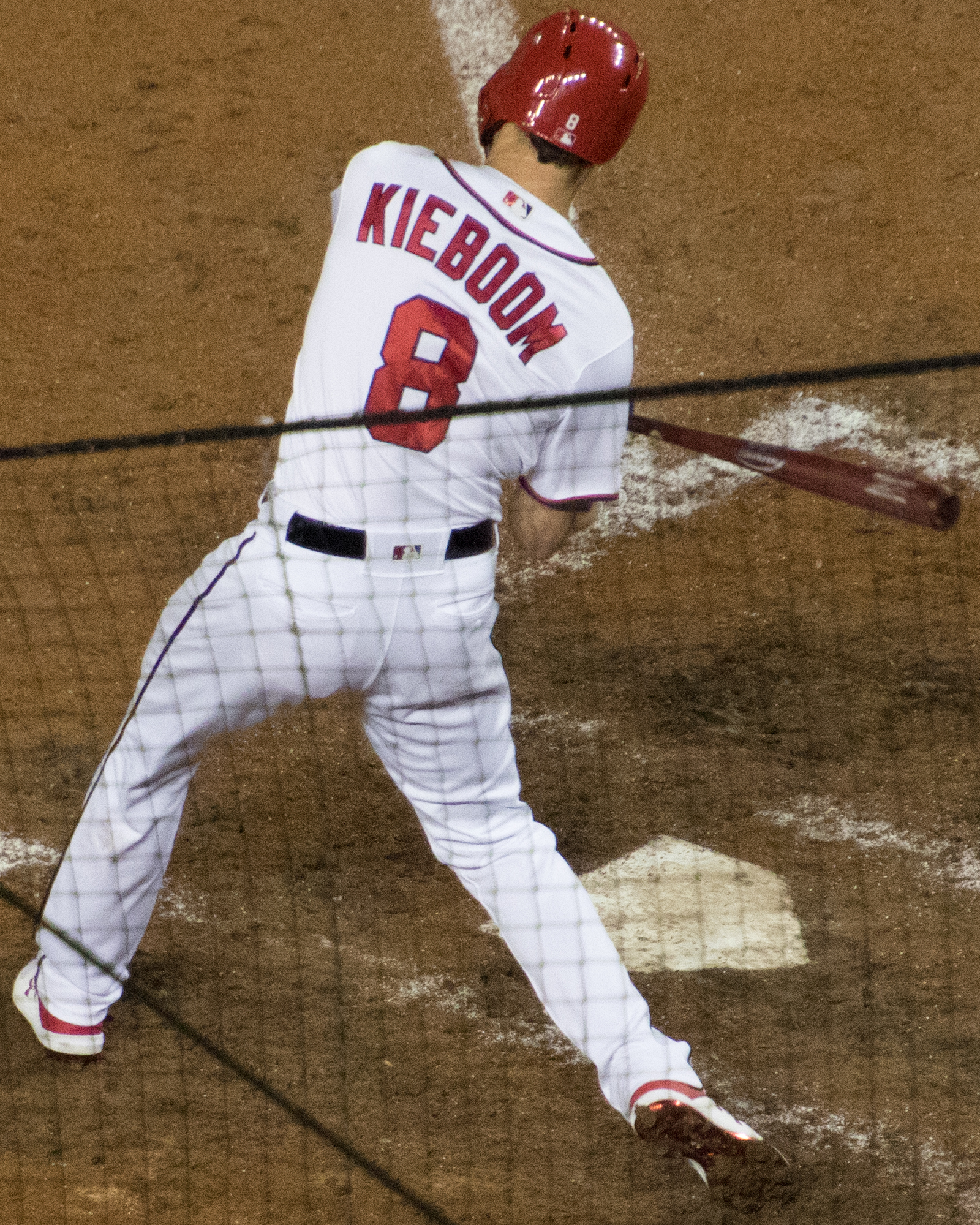 Carter Kieboom